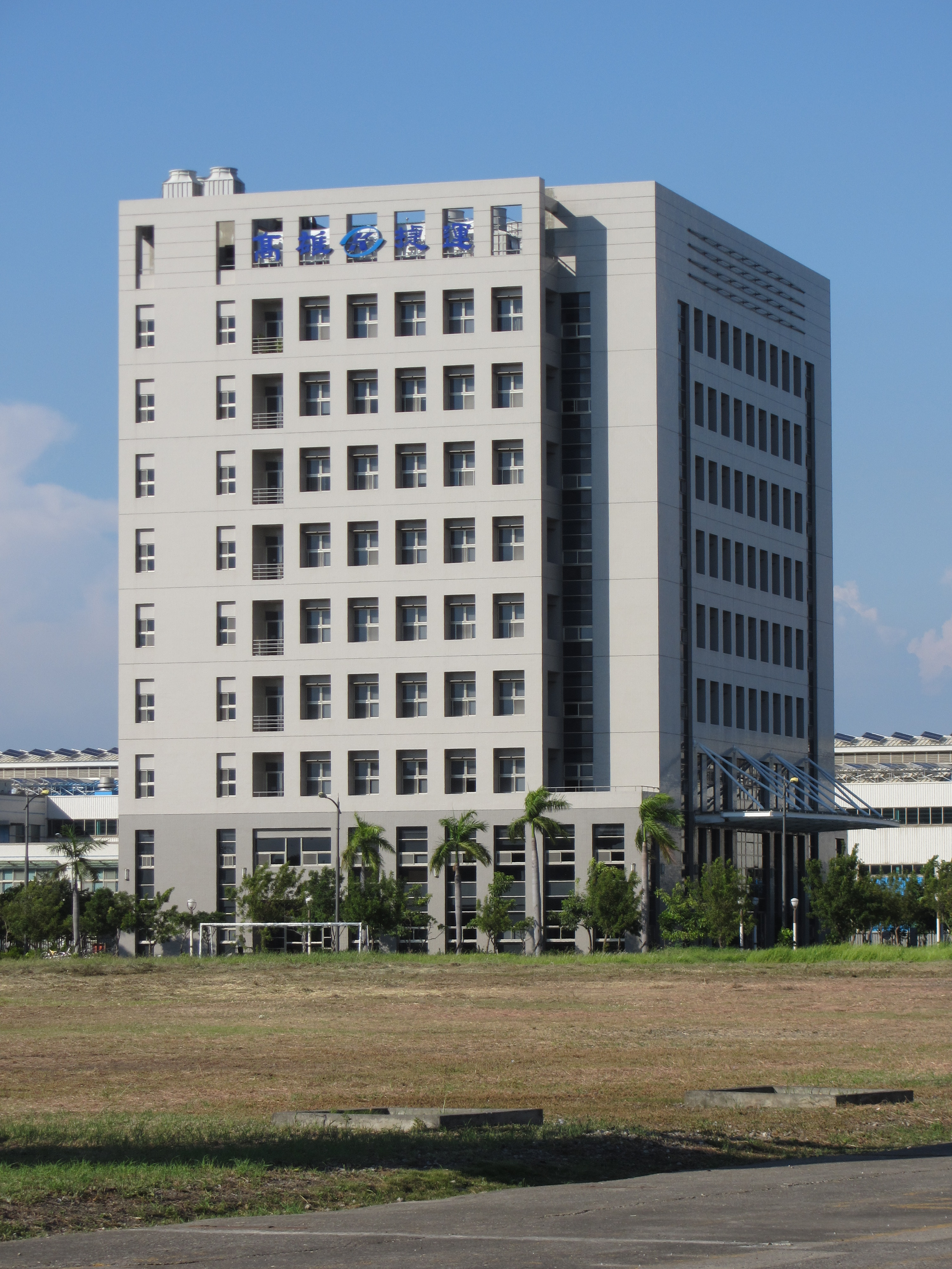 高雄捷運公司總部大樓，位於臺灣高雄市前鎮區中安路1號。